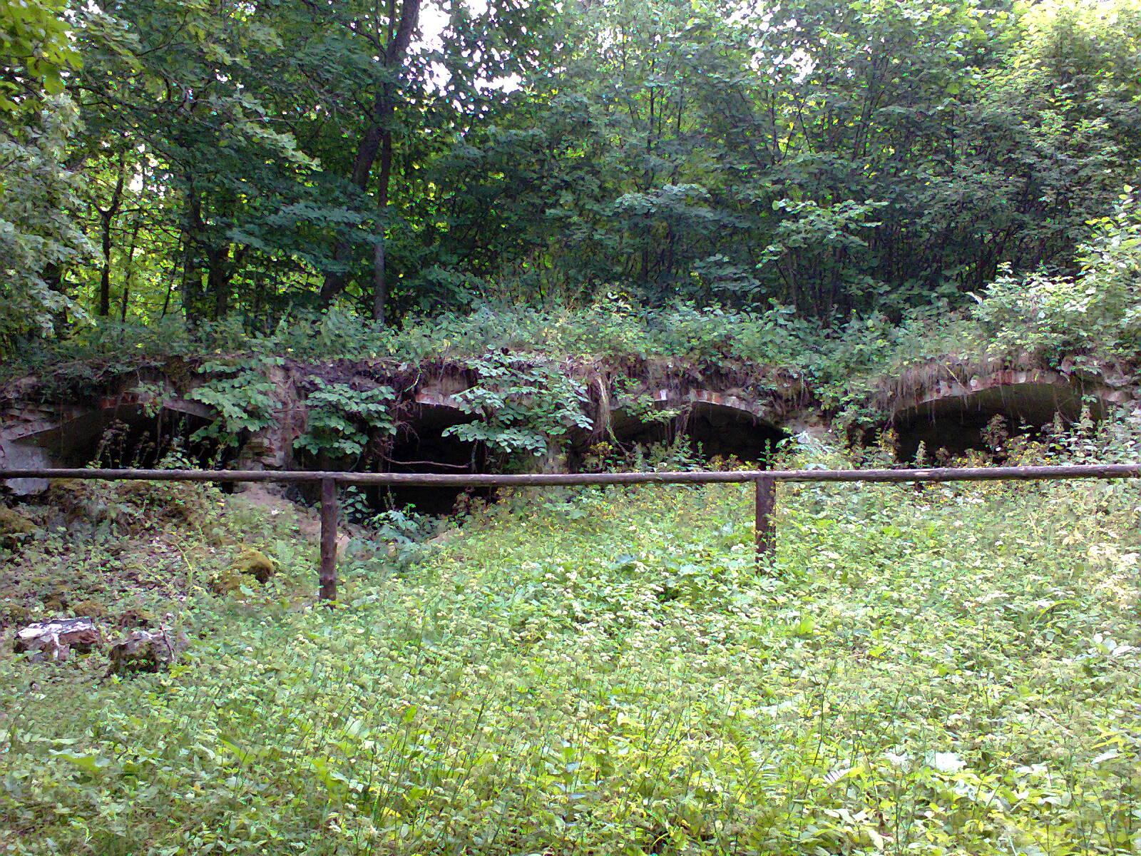 Huta żelaza w Wądołku - pozostałości pieca